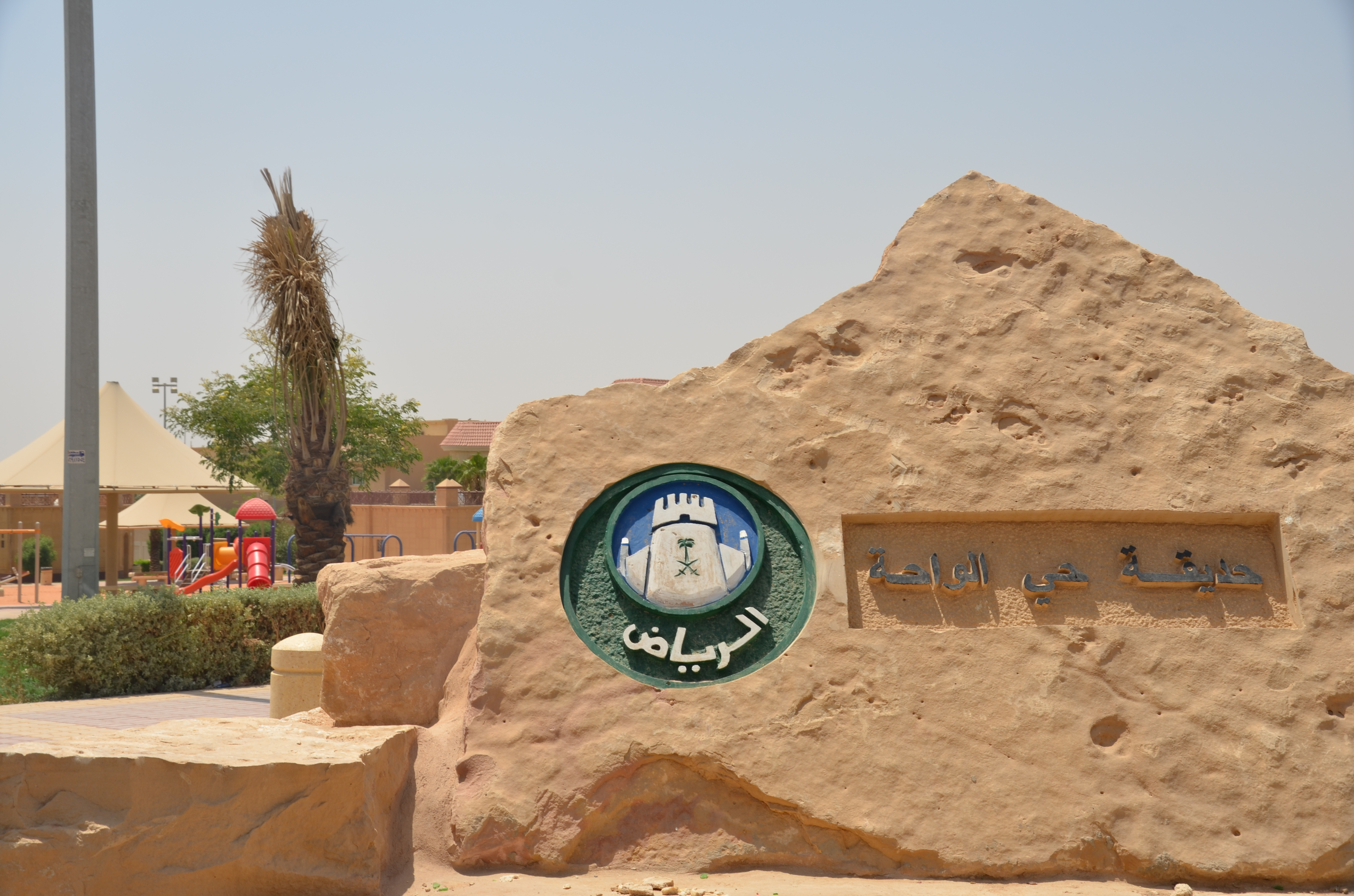 حديقة حي الواحة الرياض المملكة العربية السعودية